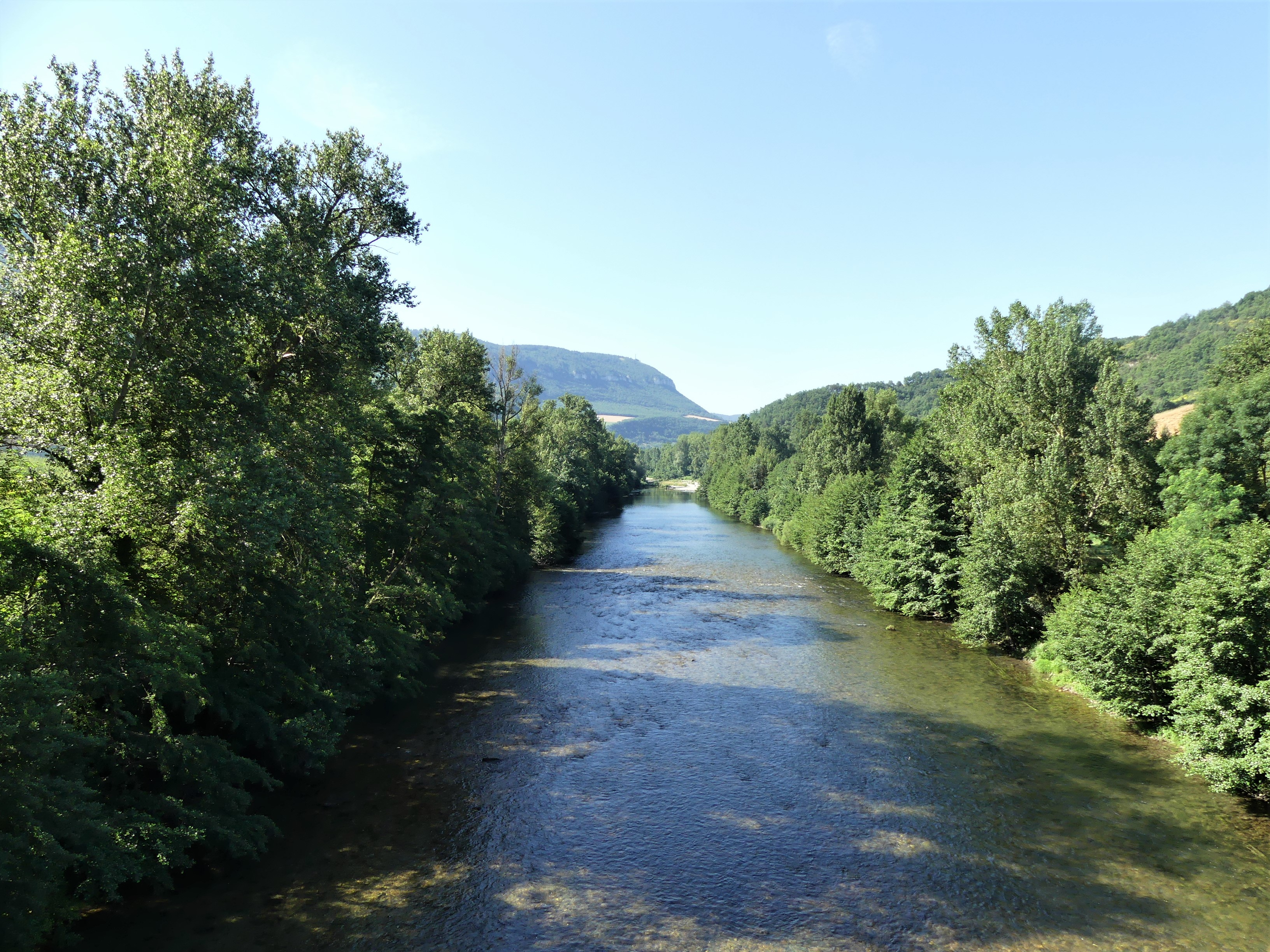 Le Tarn au pont de la route départementale 506, en limite de Paulhe (à gauche) et d'Aguessac (sur l'autre rive), Aveyron, France. Vue prise en direction de l'aval.